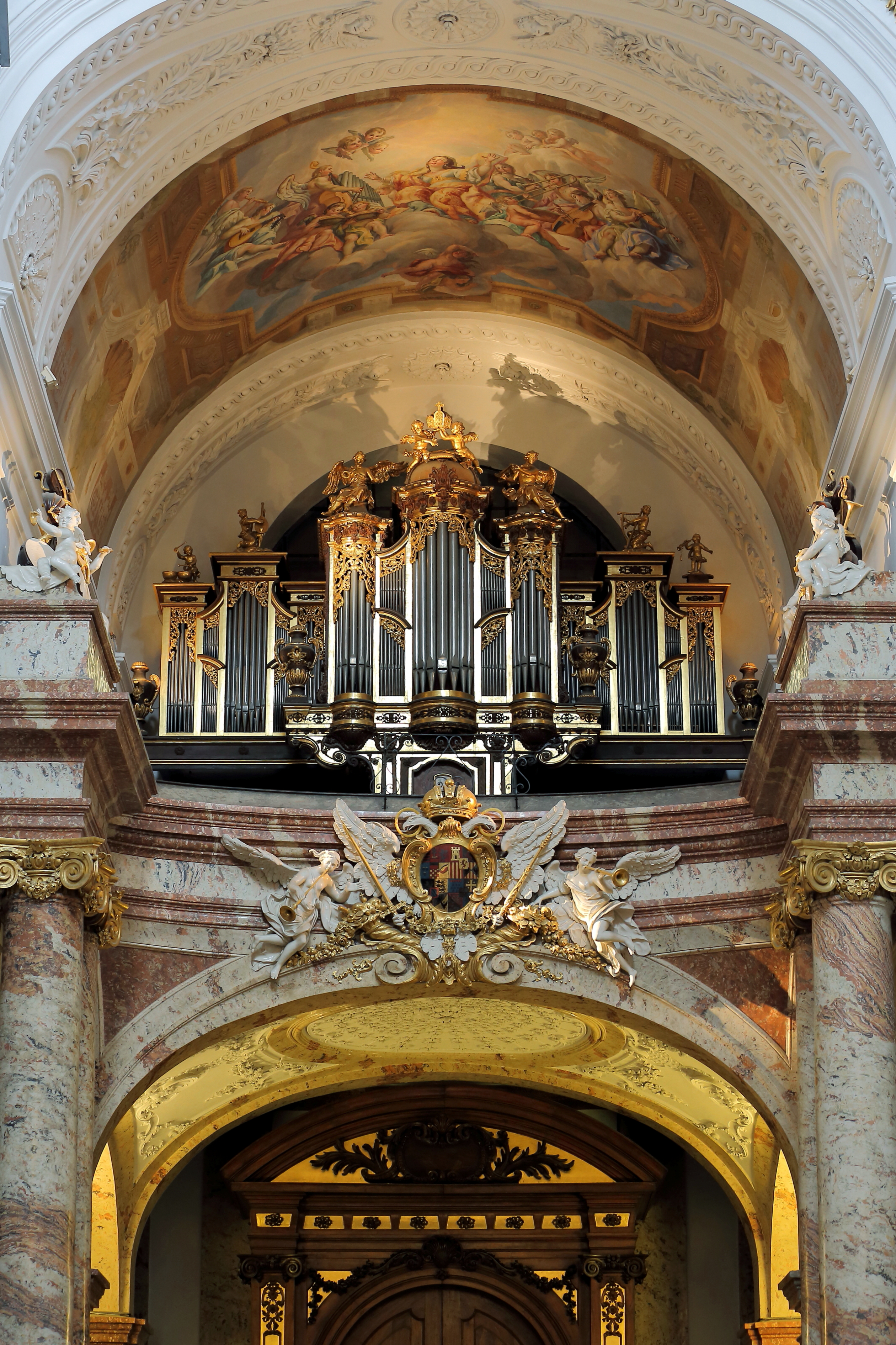 Orgel der Wiener Karlskirche. Ursprünglich 1739 von Gottfried Sonnholz (Sonholz) gefertigt. 1847 wurde die Orgel von Joseph Seyberth (Josef Seibert) umgebaut und durch den Anbau seitlicher Flügel vergrößert. Darüber befindet sich am Tonnengewölbe ein Fresko von Johann Michael Rottmayr, das eine Verherrlichung der Heiligen Cäcilia, der Patronin der Kirchenmusik, darstellt.